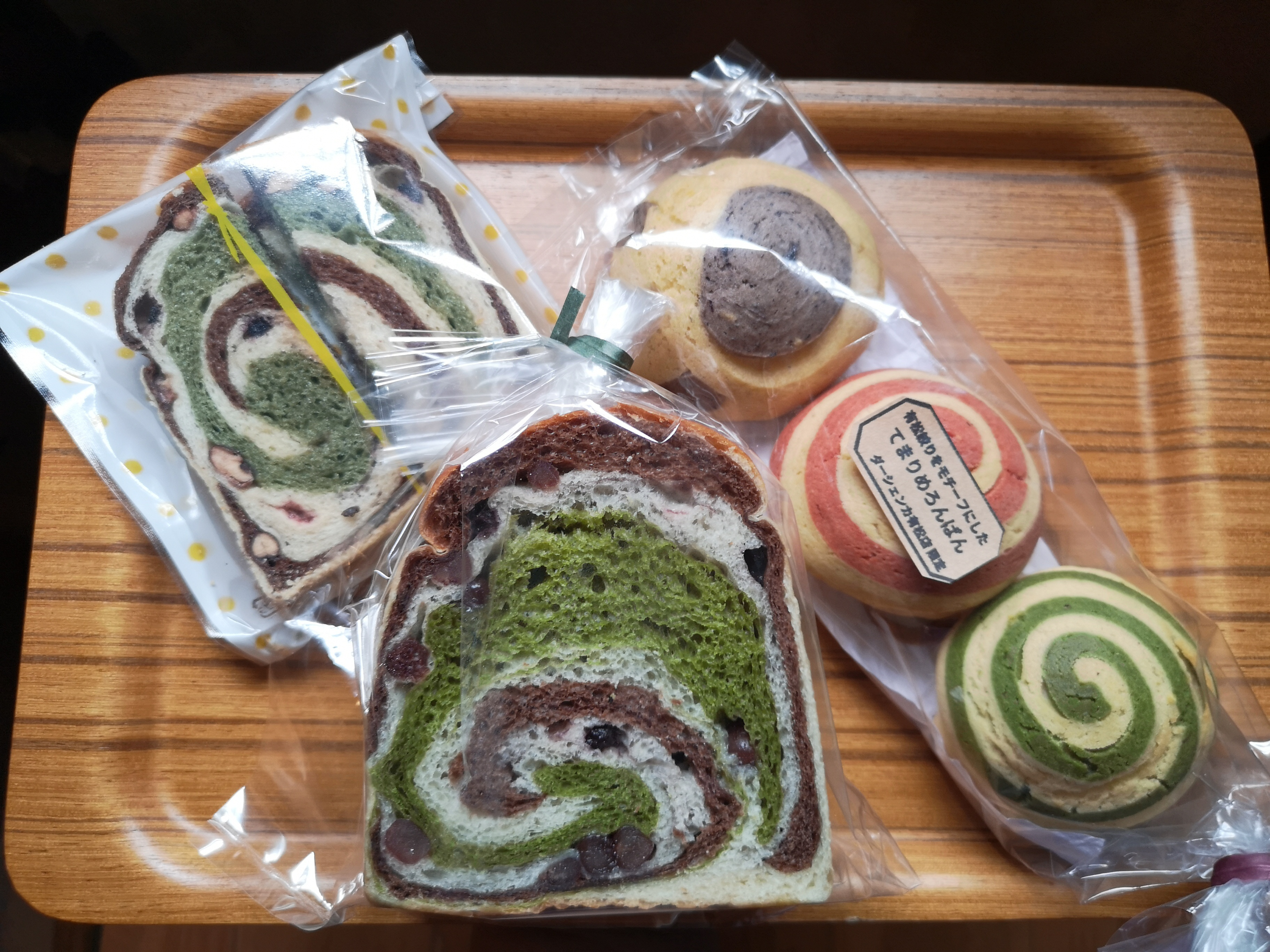 2016年4月に商品化された「有松絞り食パン」。有松高校生町おこしプロジェクト代表によって企画され、2015年11月秋田市のノースアジア大が主催した観光プランコンテストで優秀賞を受賞した。